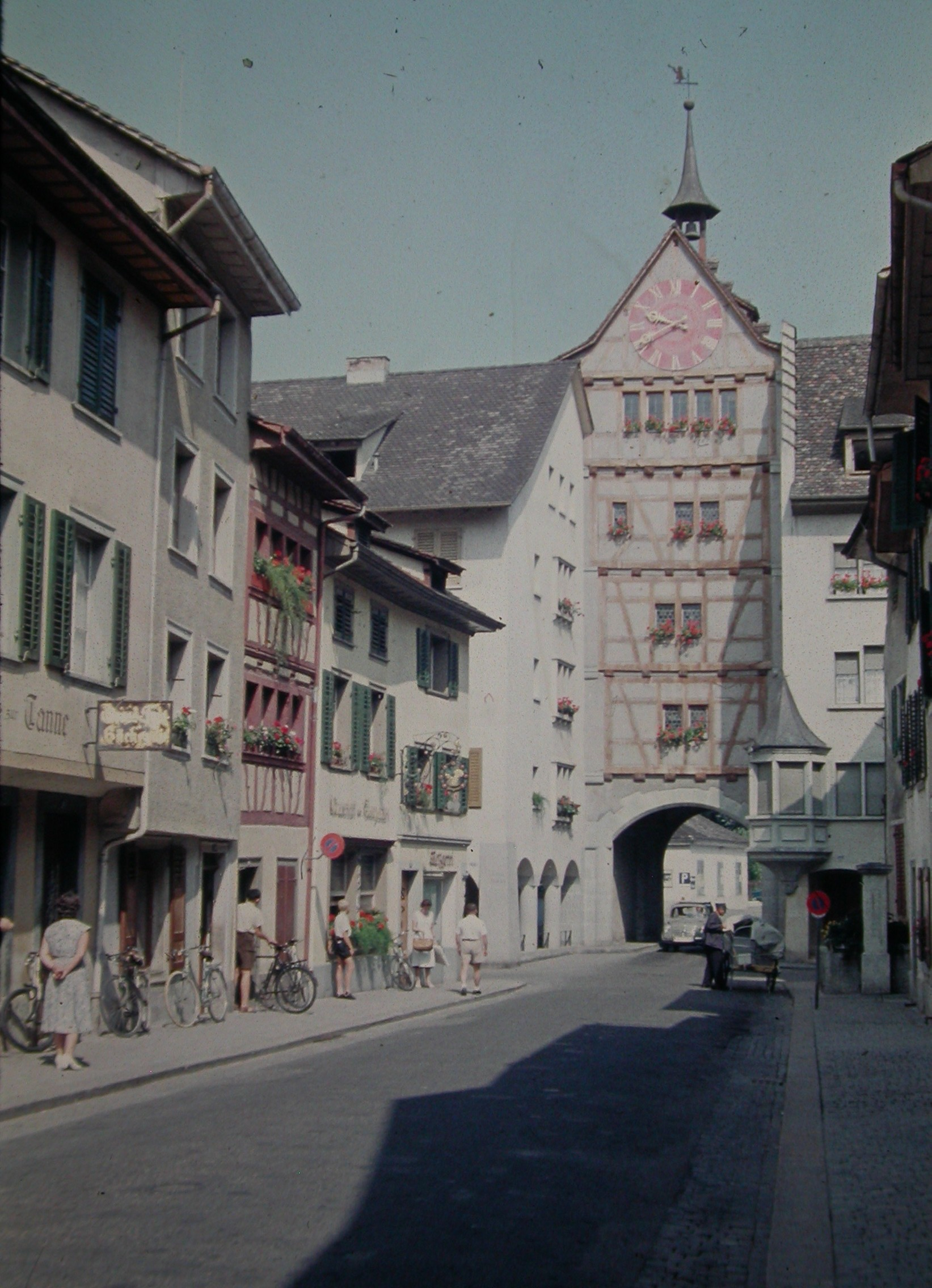 1958 beim Untertor in Stein am Rhein - man beachte den Pöstler mit Dienstmütze.